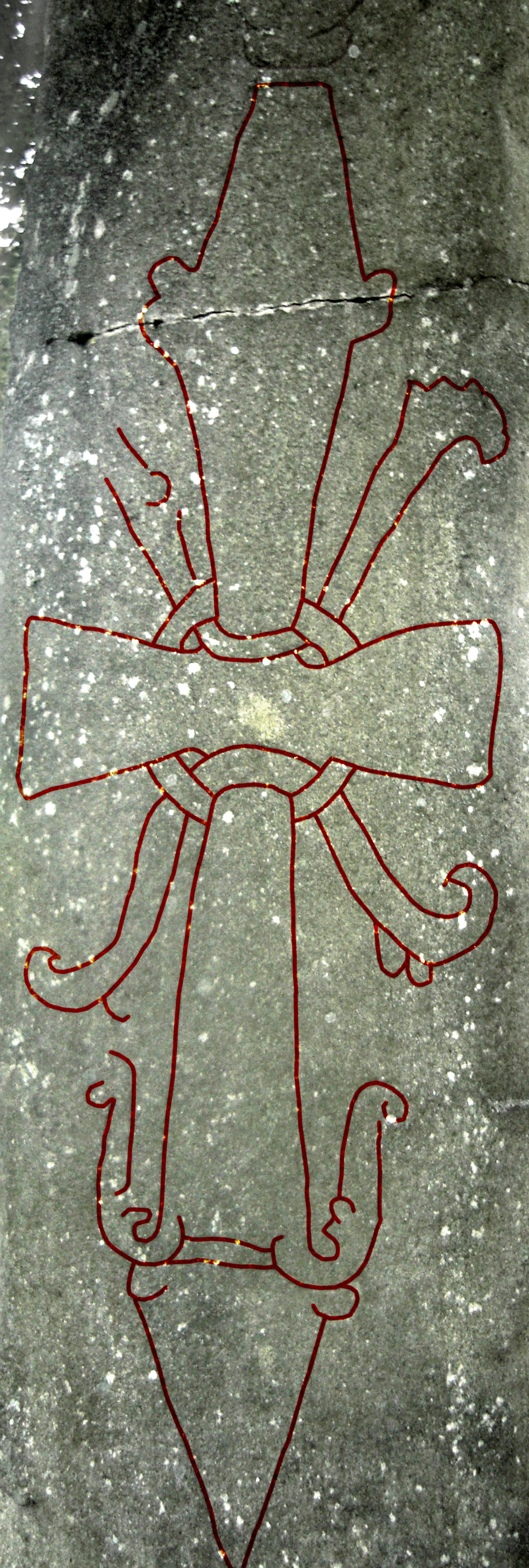 Korset på baksidan av Levenestenen Vg 117 (Raä-nr Levene 29:1) vid Levene kyrka i Viste härad, Vara kommun, f.d. Skaraborgs län, Skara stift, Västergötland, Västra Götalands län, Sverige.